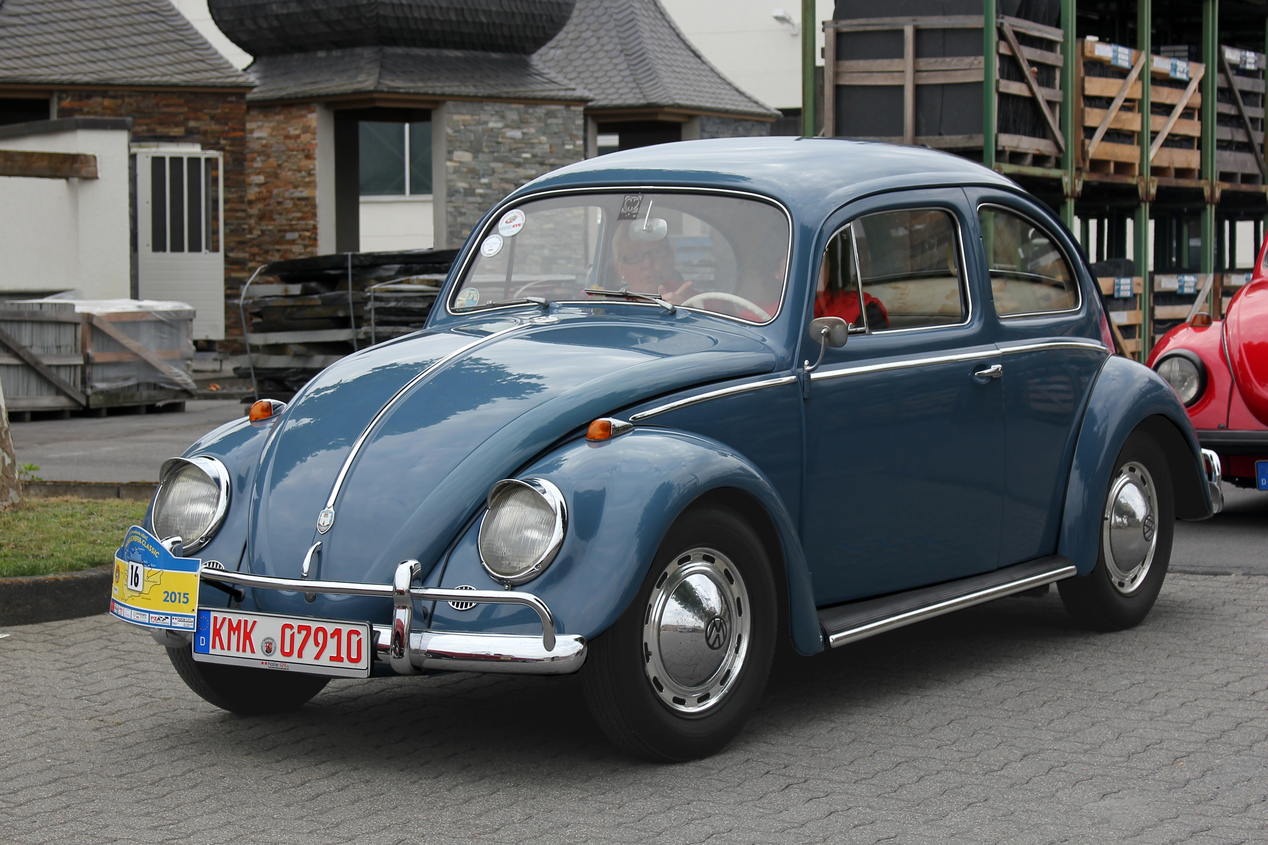 VW Typ 1 mit ab Werk lieferbaren „Rammstoßstangen“, Baujahr 1958, Motor 1192 cm³, 30 PS bei 3400/min; Blinker nachgerüstet, Schirme über den Scheinwerfern und Radzierringe aus dem Zubehörhandel (Kennzeichen des Fahrzeugs verändert)